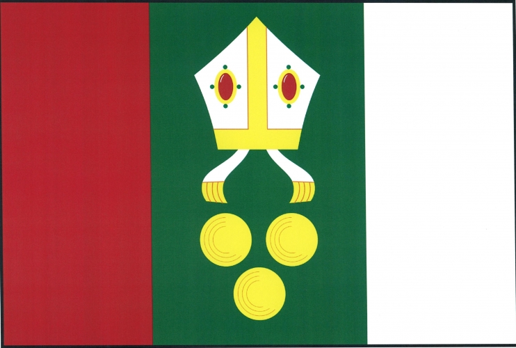 Vlajka, Lísek, okres Žďár nad Sázavou: List tvoří tři svislé pruhy, červený, zelený a bílý, v poměru 7 : 10 : 7. V zeleném pruhu bílá, žlutě lemovaná a drahými kameny zdobená mitra s bílými fimbriemi se žlutým třepením, nad třemi (2, 1) žlutými koulemi. Poměr šířky k délce listu je 2 : 3.